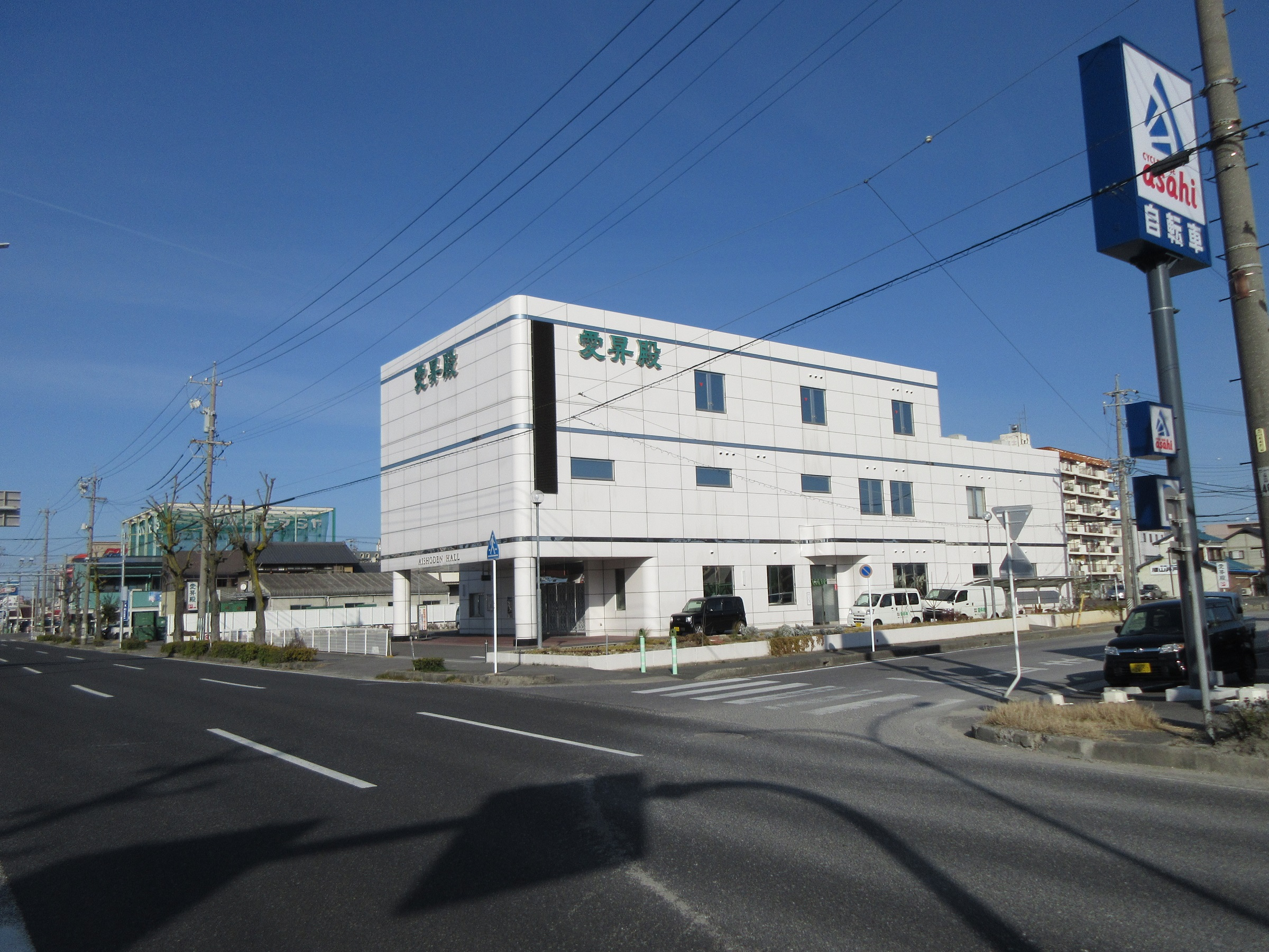 国道248号（岡崎市錦町）